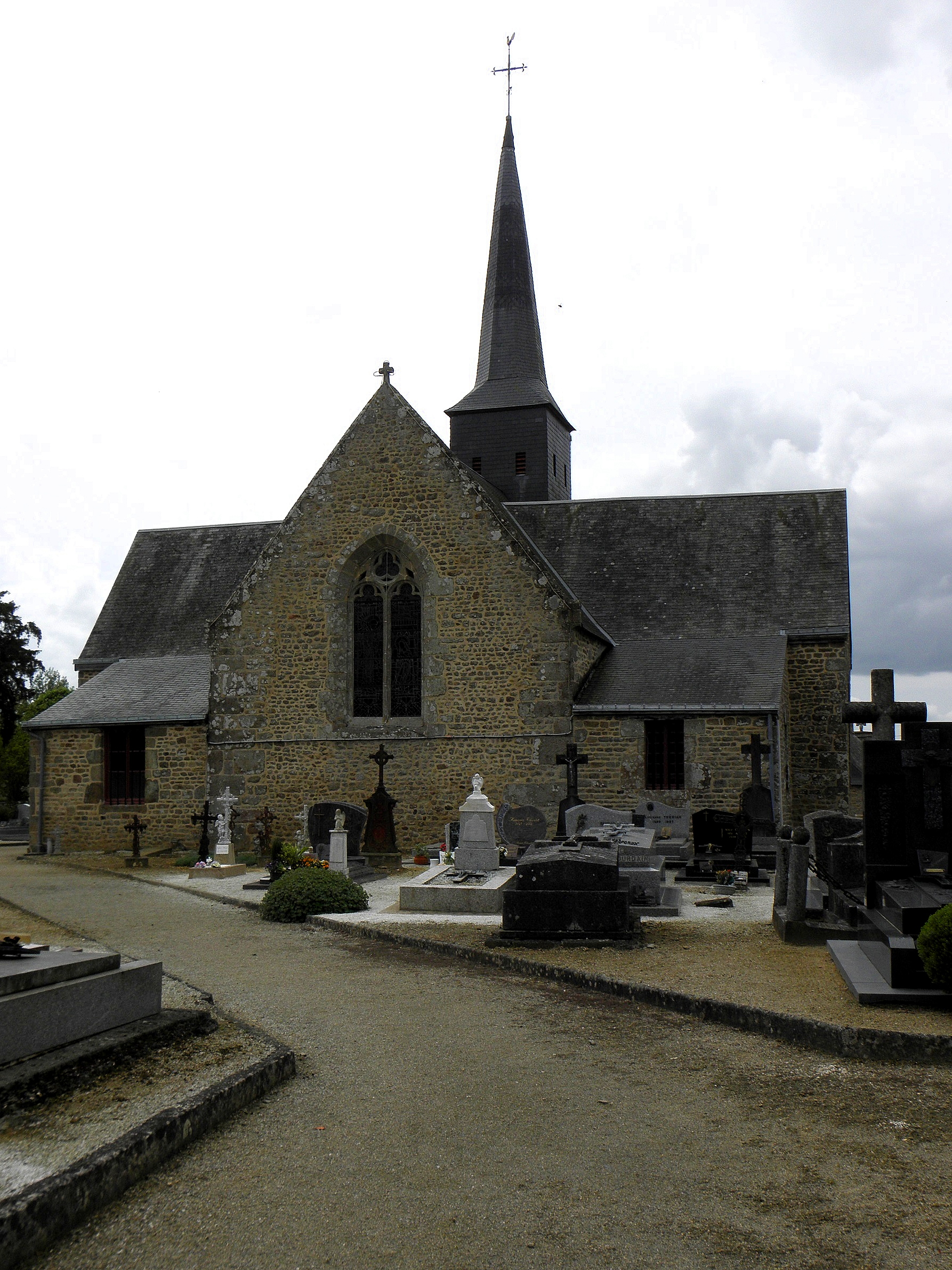 Église Notre-Dame-de-la-Visitation de Vieuvy (53). Chevet.